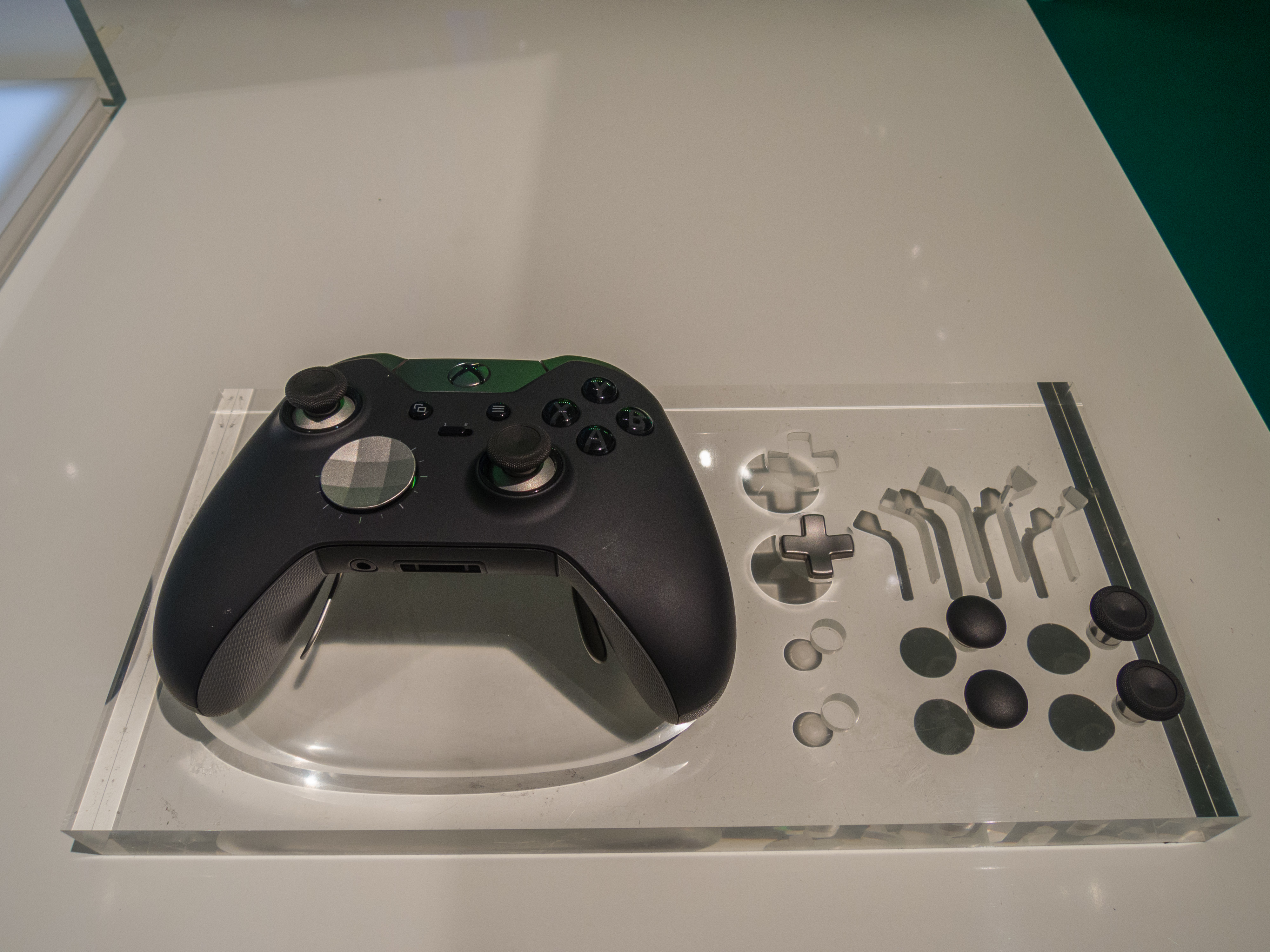 Gamescom 2015 Cologne 2015 Xbox Elite Wireless Controller